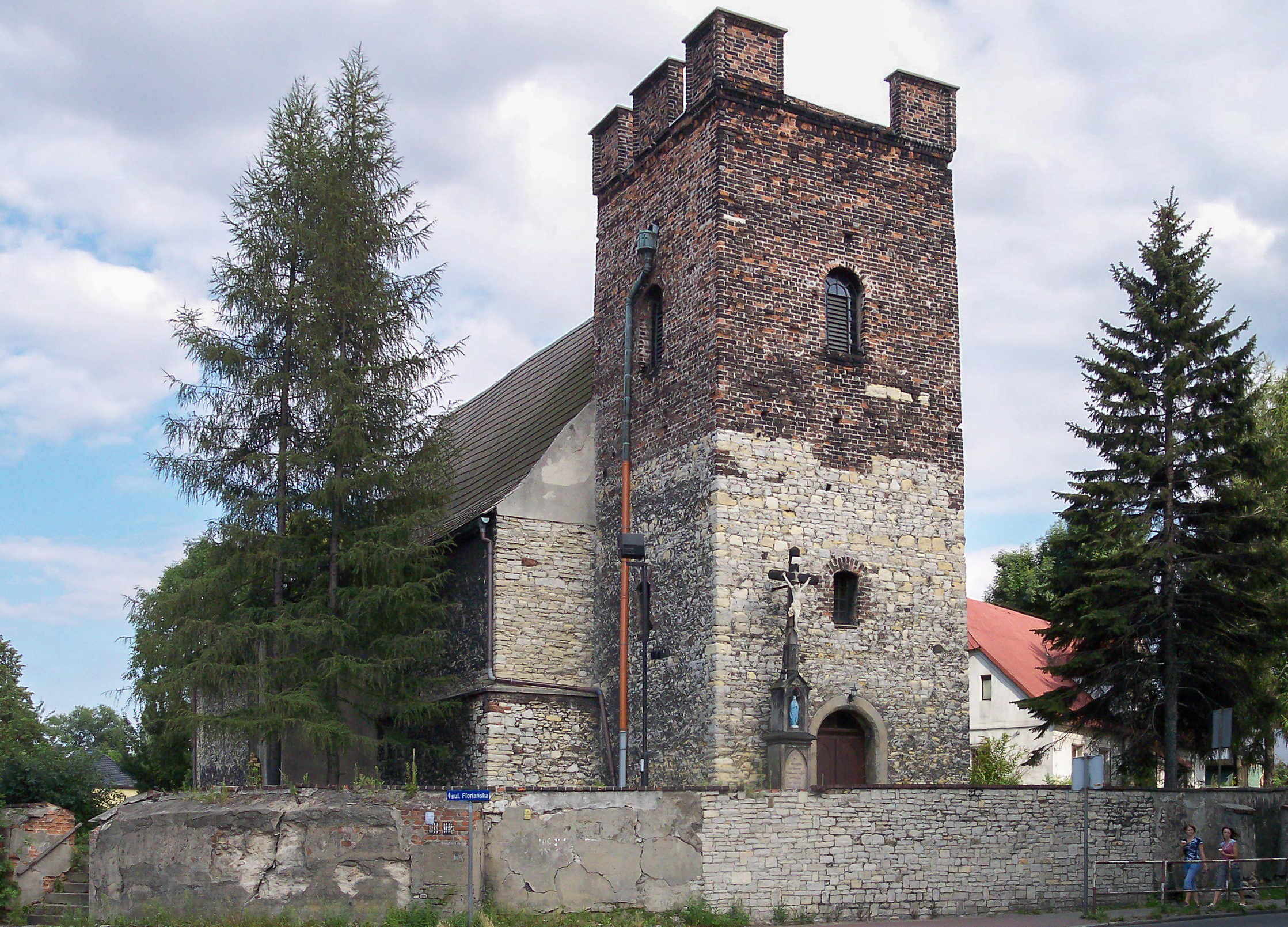 Kościół Rektorski św. Bartłomieja w Gliwicach